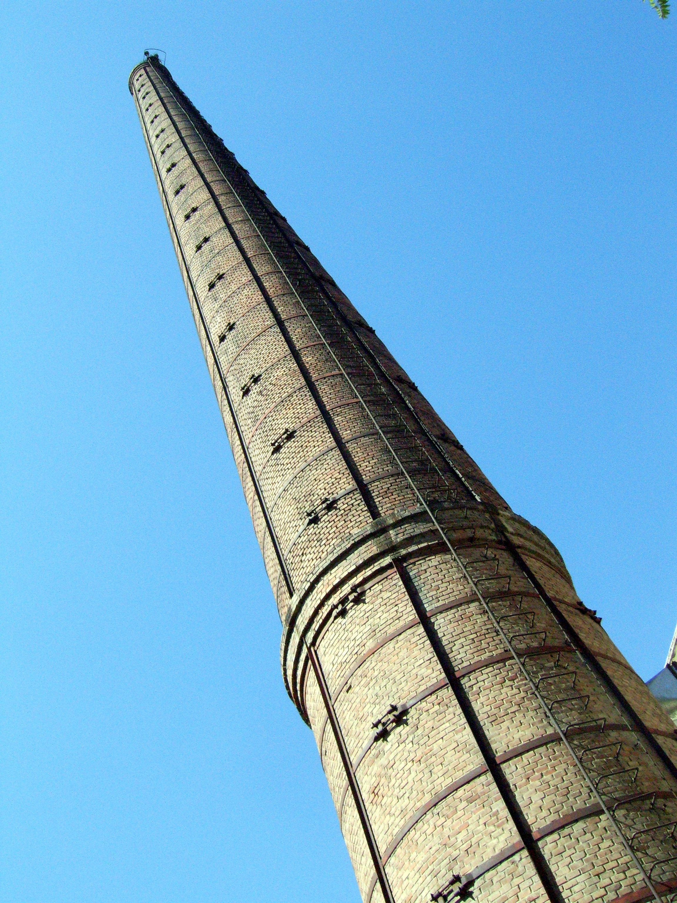 烟囱，拍摄于北京